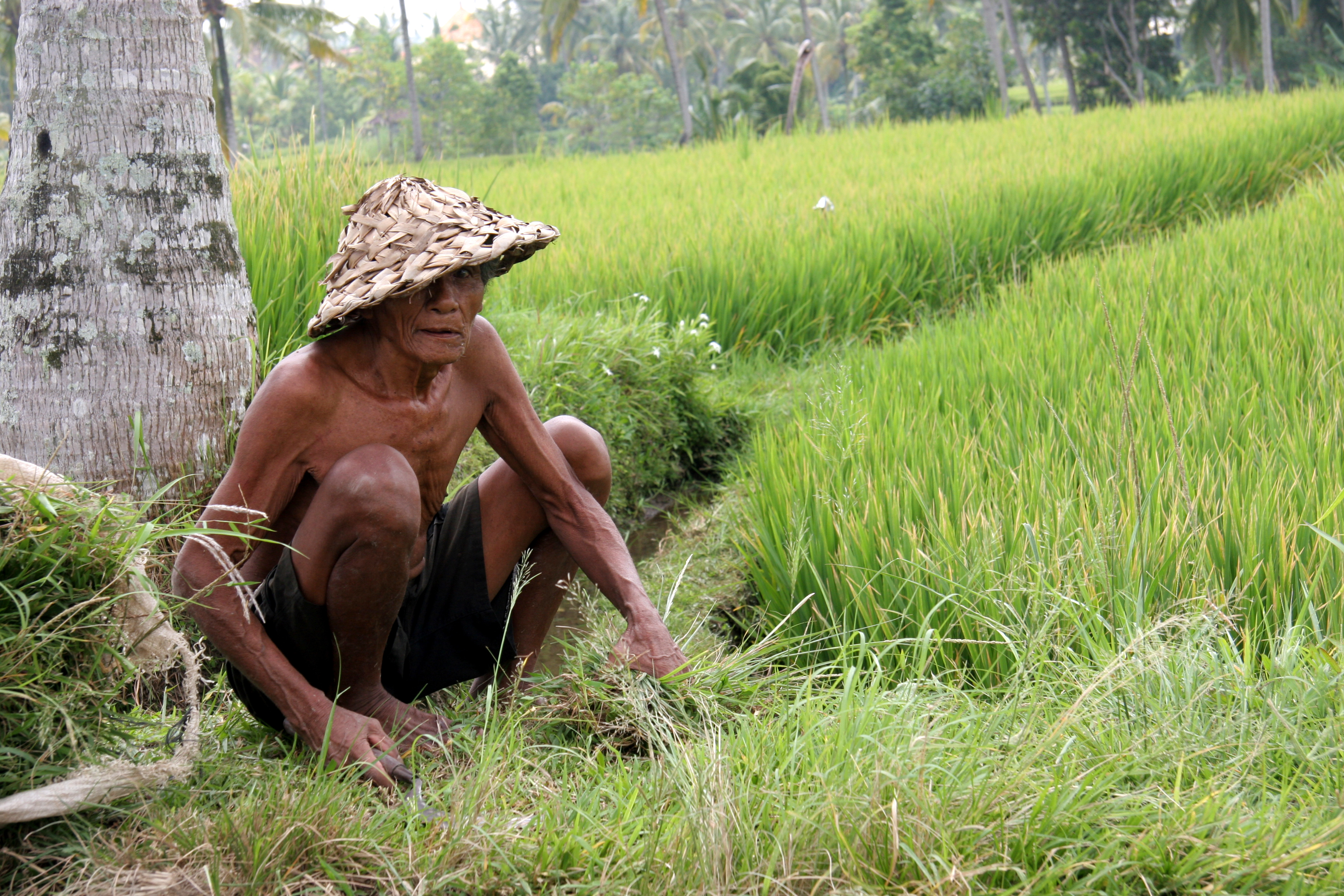 Bali balinais travaillant dans une rizière